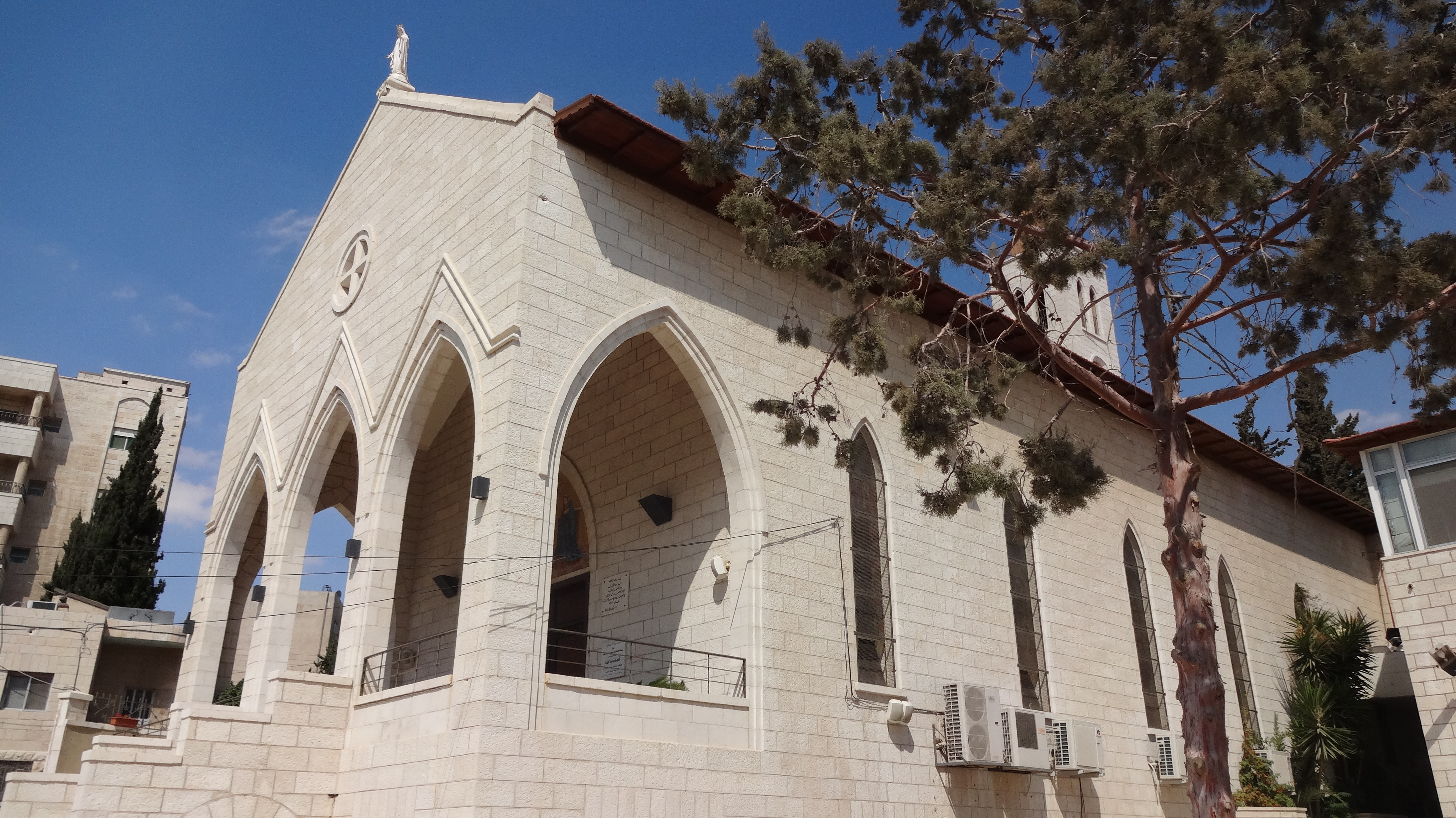 سيدة البشارة. من معالم عمان الدينية في جبل اللويبدة. 1961